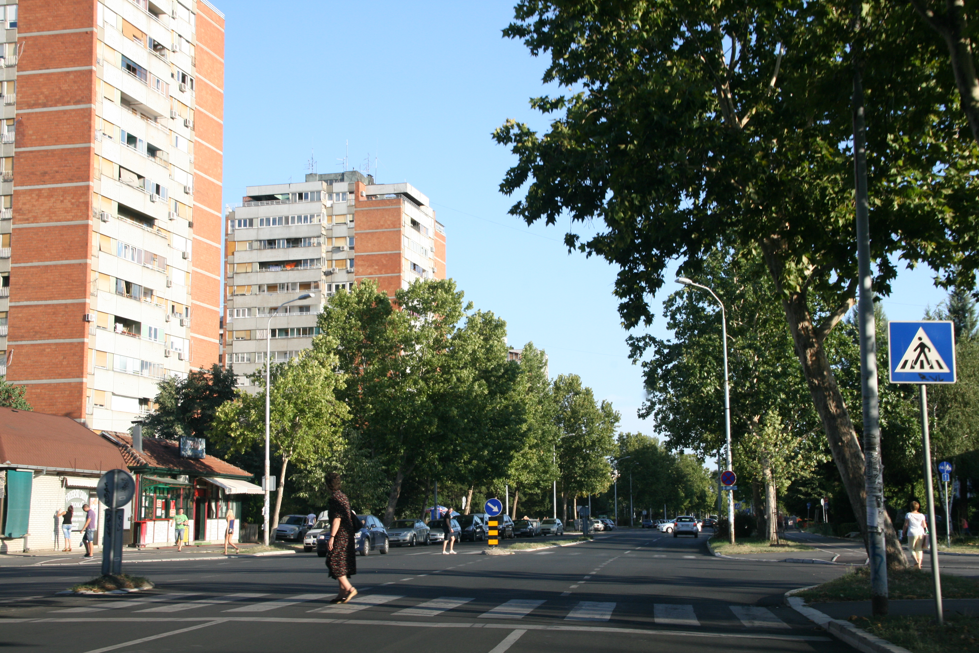 Гандијева улица између Блокова 70 и 44, поглед у правцу Савског кеја